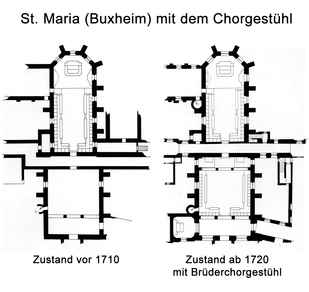 Grundriss der ehemaligen Reichskartausenkirche St. Maria im oberschwäbischen Buxheim mit den Chorgestühlen im Priesterchor und Brüderchor